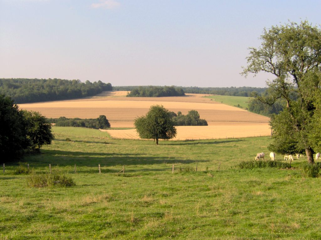 Paysage de la commune de Fouchères-aux-Bois (Meuse, France). La vue est prise depuis le village, vers le nord-est. Photo prise le 14 juilet 2005 en soirée.